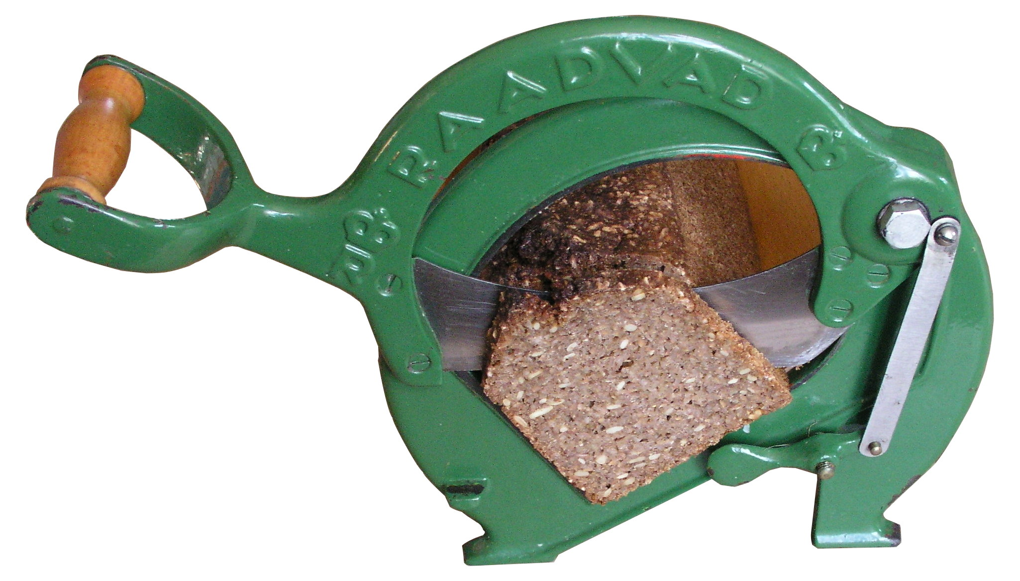 Dansk rugbrød i velkendt brødmaskine fra Raadvad.